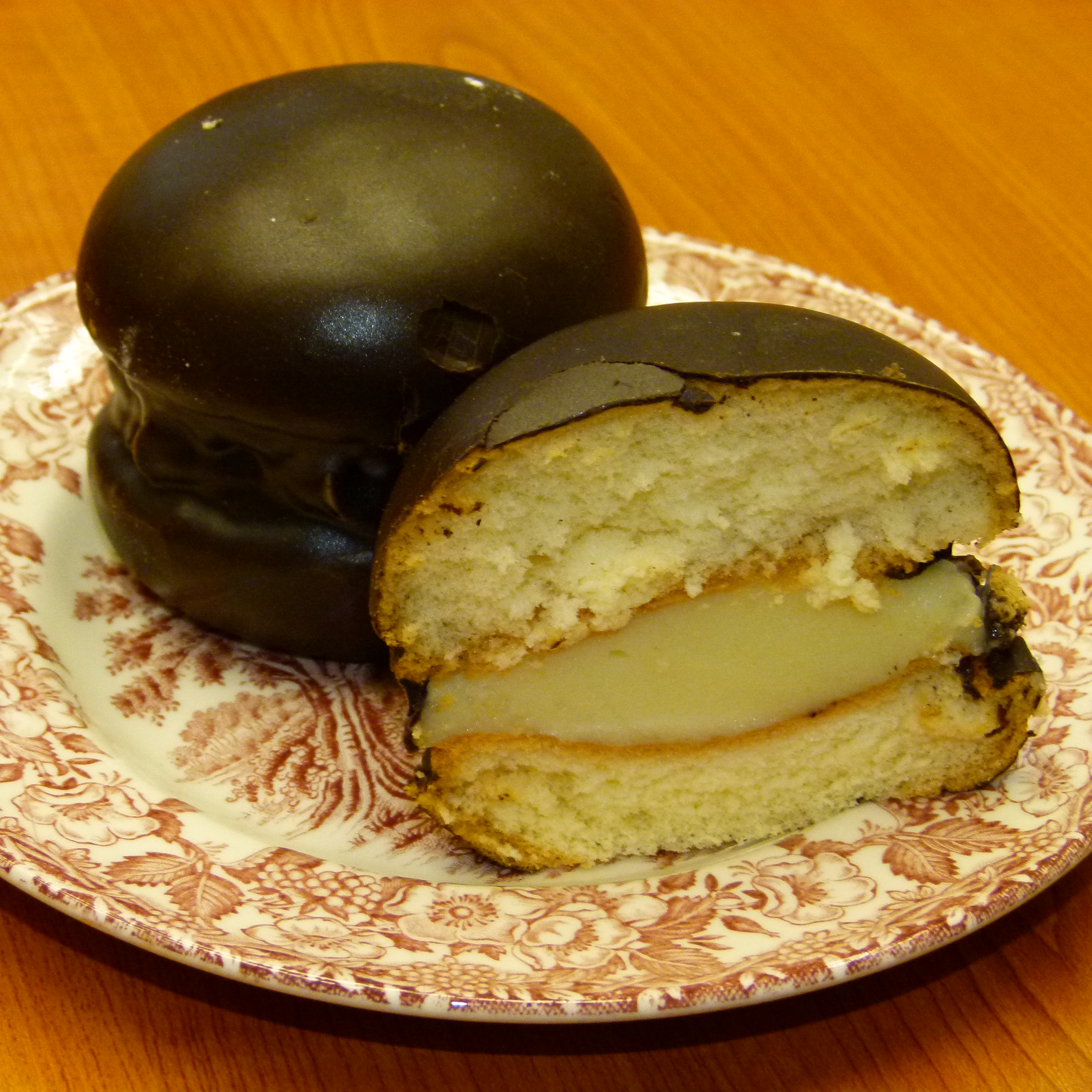 Mohrenkopf mit Vanillepudding, Bäcker Möbius, Dresden